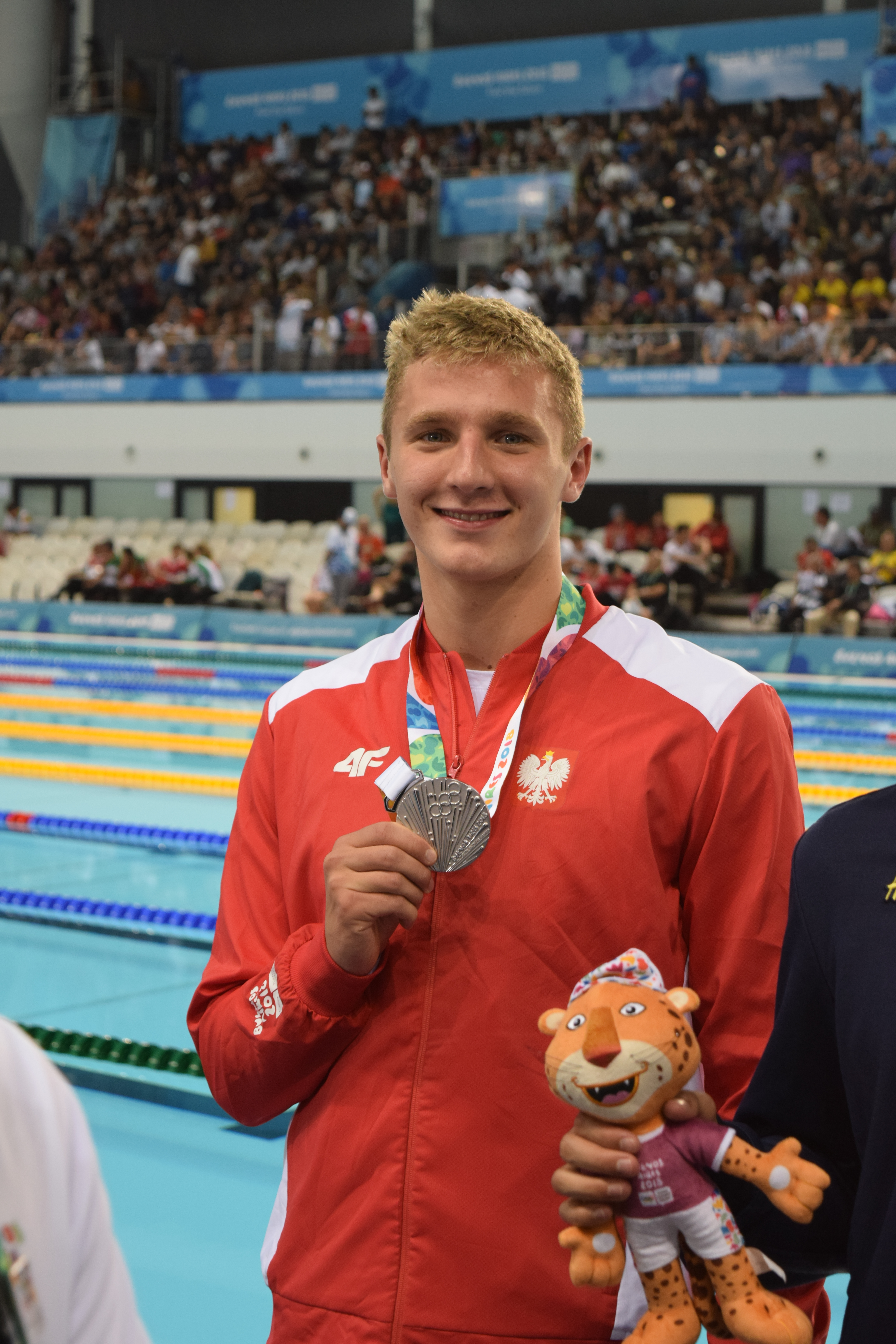 Finales de natación , durante los Juegos Olímpicos de la Juventud 2018 en Buenos Aires. Tarde del 10 de octubre. Jakub KRASKA.